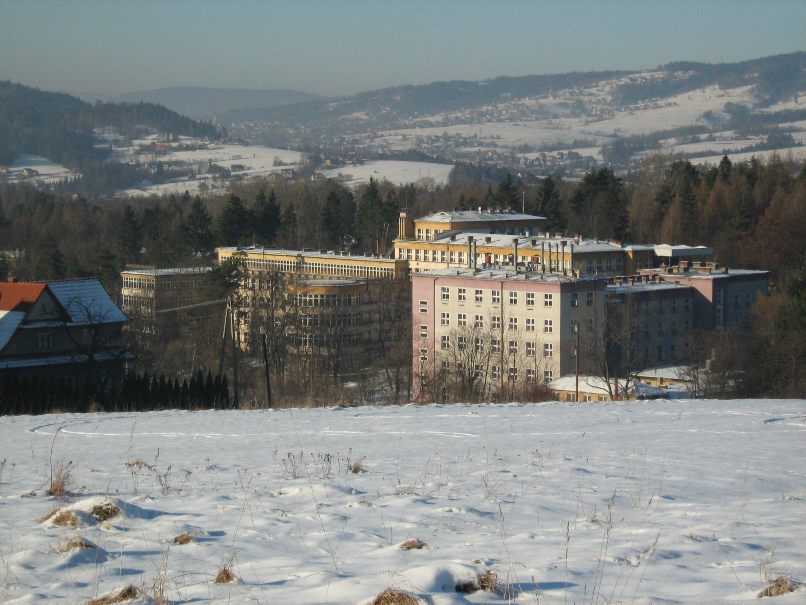 Rabka Zdrój, Górnośląski Ośrodek Rehabilitacyjny im. doc. A. Szebesty